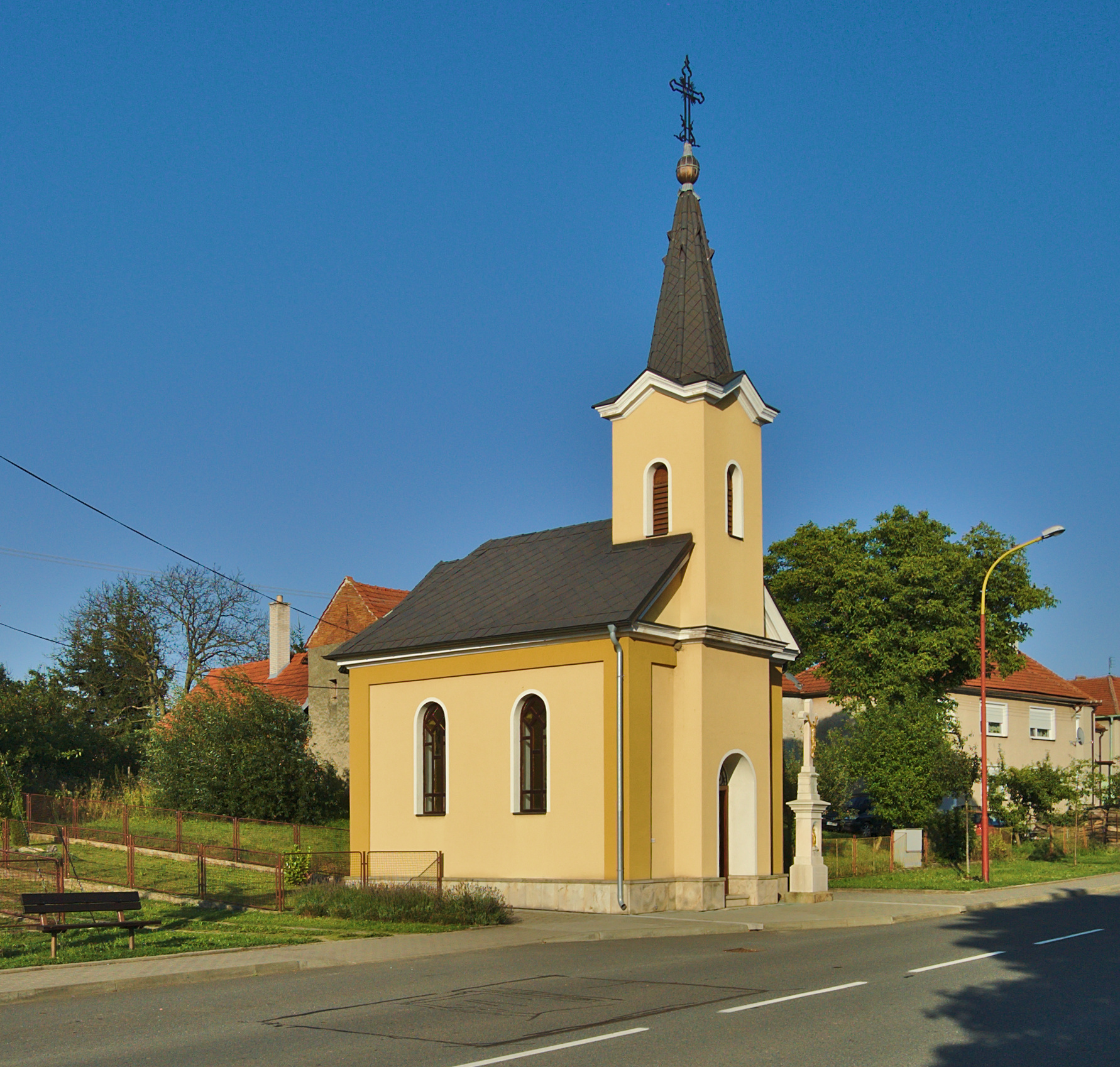 Kaple, Hvozd, okres Prostějov